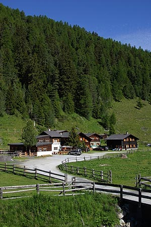 Gruben im Turtmanntal